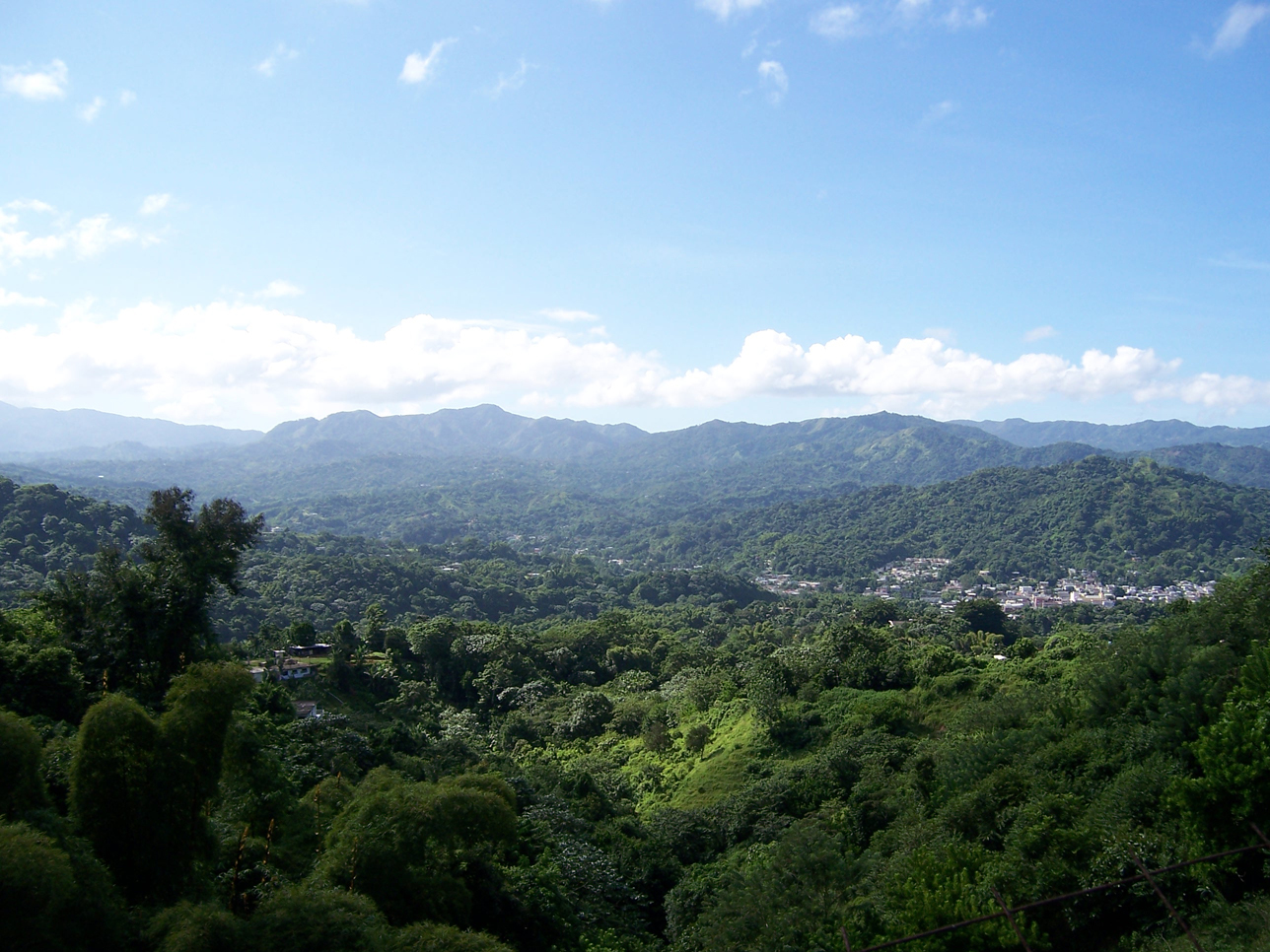 View of Utuado Pueblo Puerto Rico from Barrio Sabana Grande